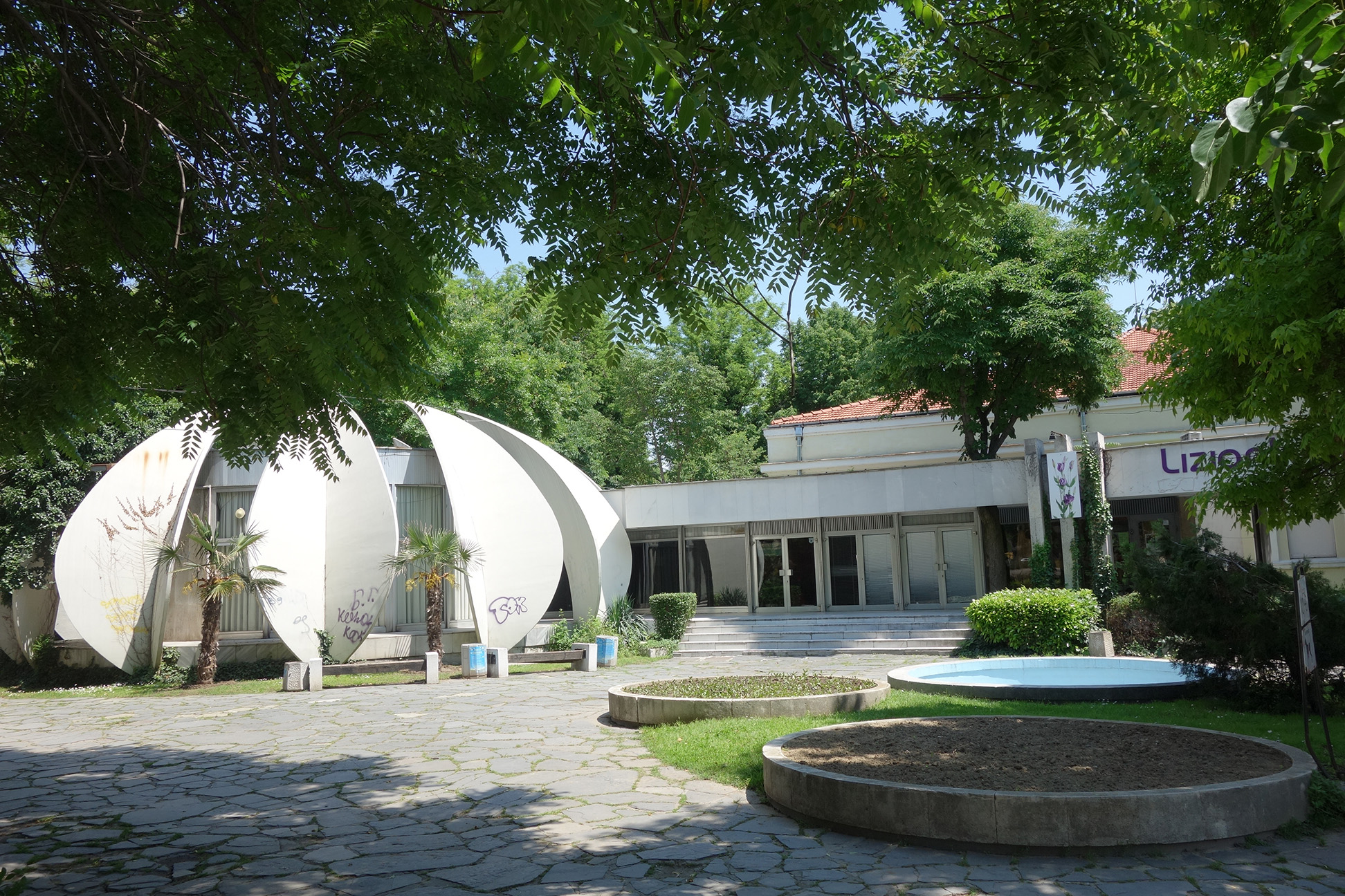 Дом на новороденото, Пловдив